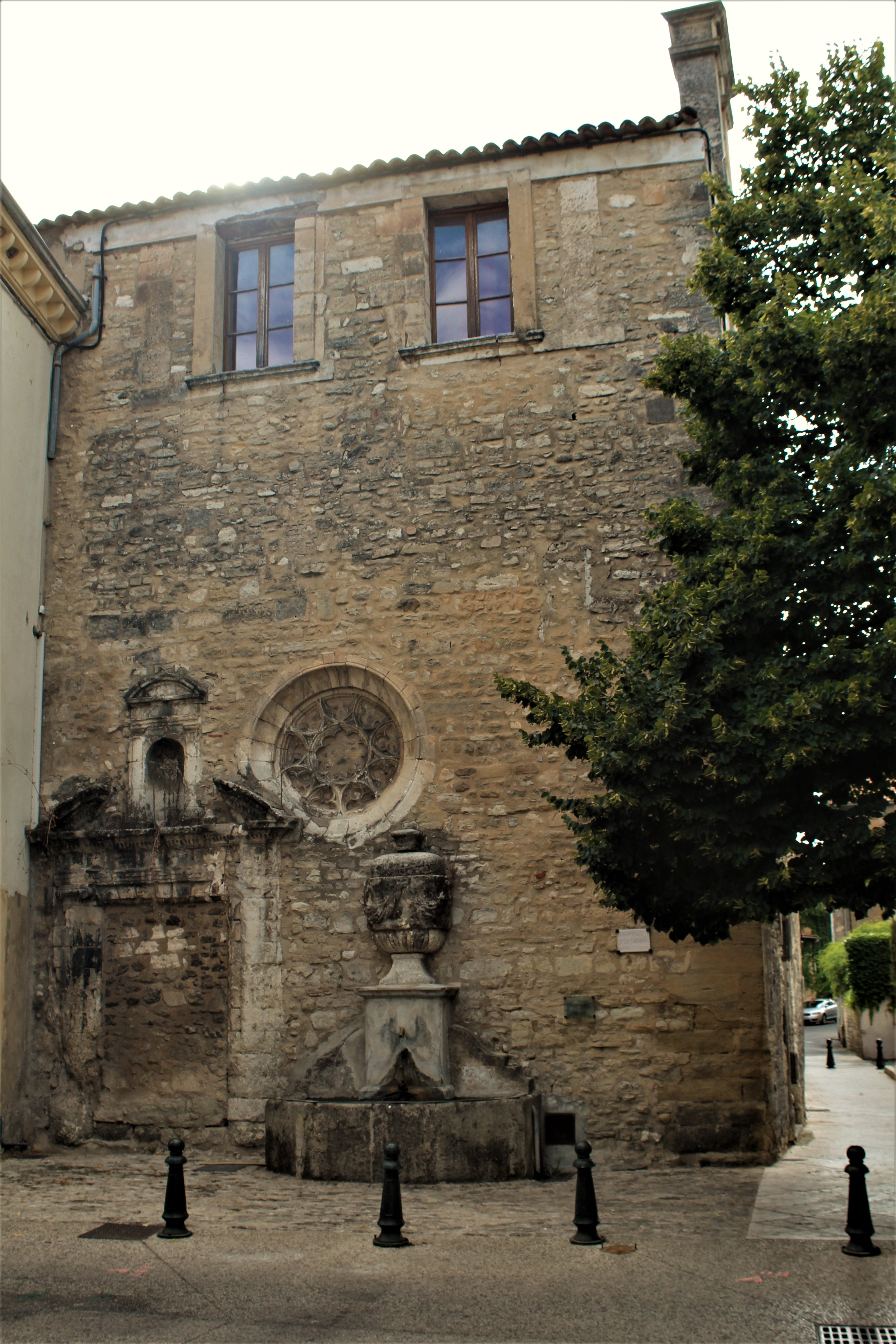 Chapelle Sainte-Catherine d'Apt.